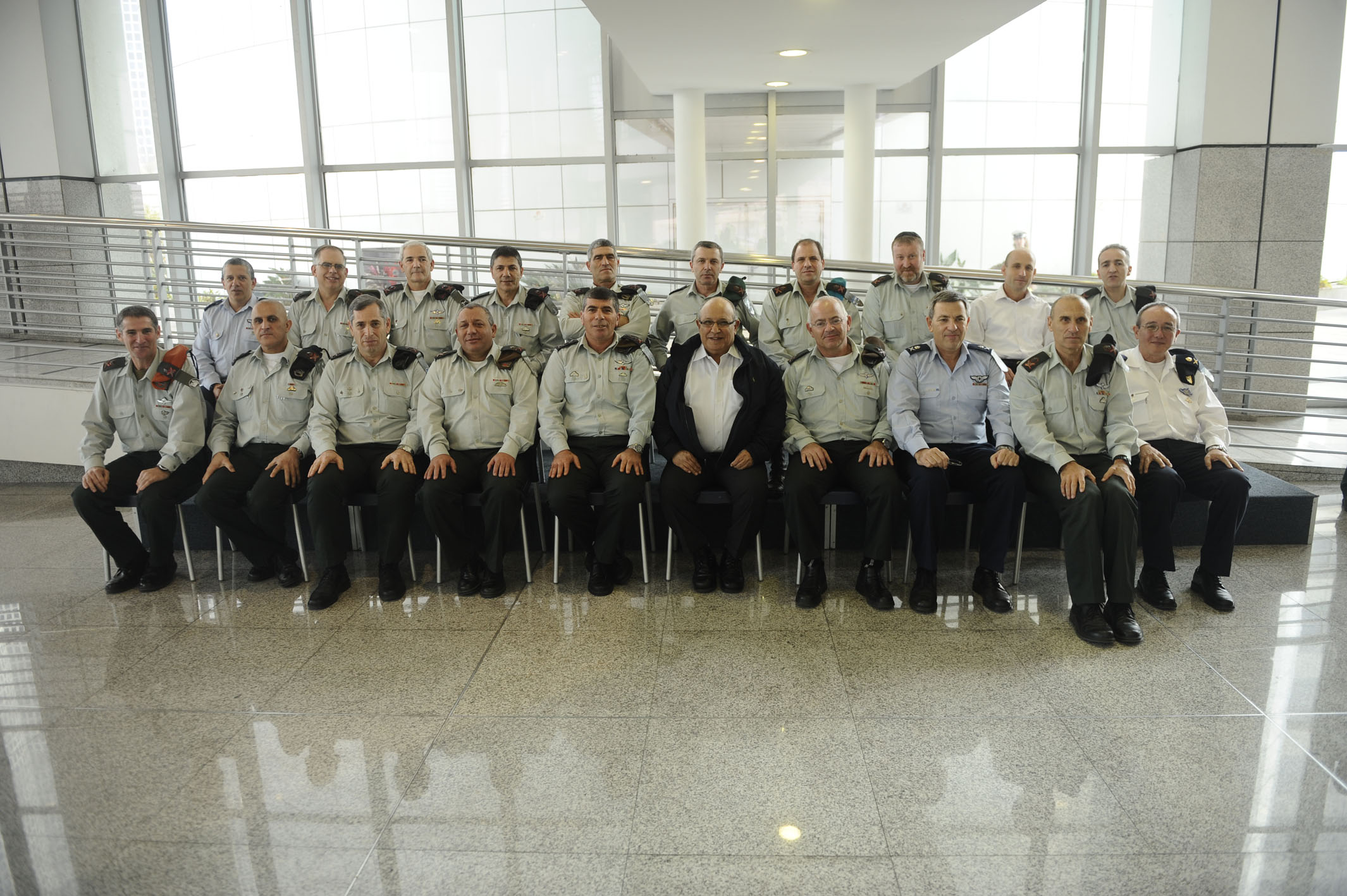 January 10, 2011 Today, the IDF Chief of Staff, Lt. Gen. Gabi Ashkenazi, as well as members of the General Staff, parted with the outgoing Director of the Mossad Intelligence Agency, Maj. Gen (res.) Meir Dagan in a celebratory lunch at the Rabin base in Tel Aviv. The Chief of Staff thanked the outgoing Mossad Director for his combined effort and said, "During the past eight years, as head of the Mossad, you were on the forefront of achievement. You led the agency during a unique and challenging period and contributed exceptionally, with most of your achievements unknown. Over the eight years we've worked together collaboratively and with the mutual understanding that we are working towards a shared and higher goal--the security of the State of Israel." The outgoing Director thanked the Chief of Staff for the years of cooperation and wished him and the General Staff luck in the rest of their endeavors. Pictured: The General Staff with Maj. Gen. (res.) Meir Dagan Photography: Cpl. Ori Shifrin, IDF Spokesperson's Unit הרמטכ"ל, רא"ל אשכנזי, וחברי פורום המטה הכללי נפרדו היום (ב') מראש המוסד היוצא, אלוף (במיל') מאיר דגן, בארוחת צהריים חגיגית בבסיס רבין בת"א. הרמטכ"ל הודה לראש המוסד היוצא על העבודה המשותפת ואמר כי "בשמונה השנים האחרונות, כראש המוסד, היית בחזית העשייה, הובלת את הארגון בתקופה מיוחדת ומאתגרת ותרמת תרומה ייחודית שרובה לא ידועה. בשנים האחרונות עבדנו יחד בשיתוף פעולה ומתוך הבנה שאנחנו משרתים מטרה משותפת ועליונה- ביטחונה של מדינת ישראל". ראש המוסד היוצא הודה לרמטכ"ל על שיתוף הפעולה ואיחל לו ולחברי פורום מטכ"ל הצלחה בהמשך העשייה החשובה. בתמונה: פורום מטכ"ל והאלוף (מיל') דגן. צילום: רב"ט אורי שיפרין, דובר צה"ל